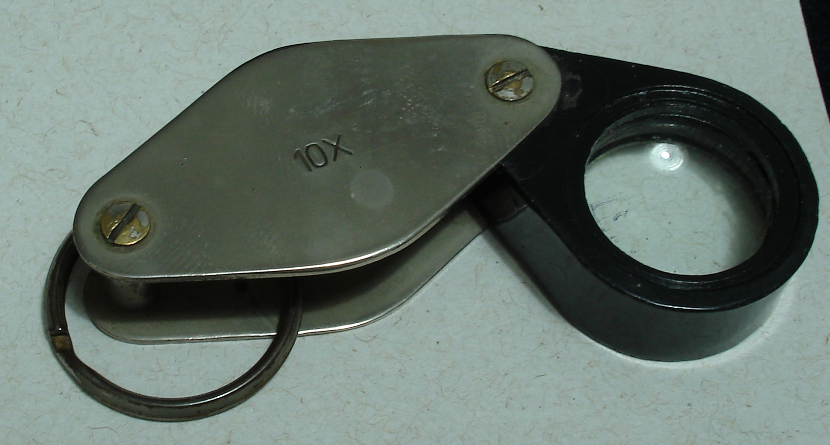 10X- loupe